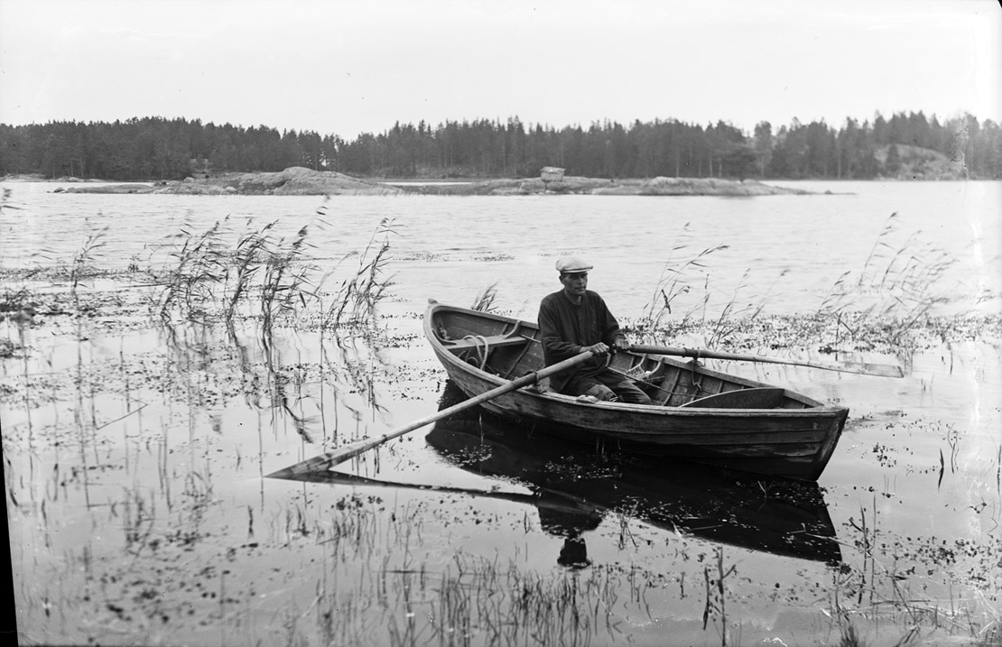 Roddsump från Valmo, Nagu, Finland. 1932. SLS, Folkkultursarkivet Signum: sls410a_29